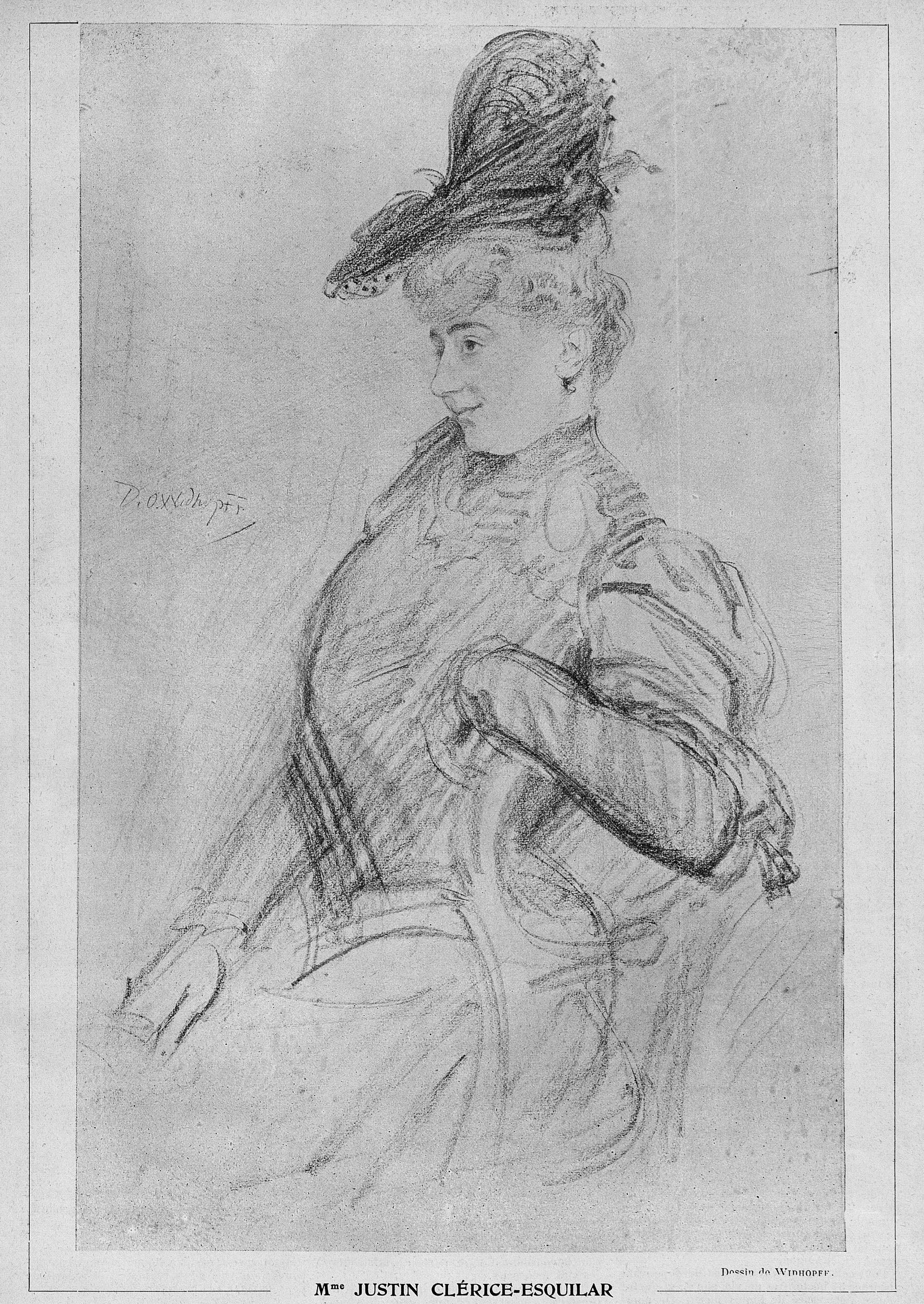 Mme Justin Clérice-Esquilar, Le Courrier français